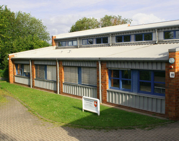 Die technischen Werkstätten des Niedersächsischen Landesarchivs -Staatsarchiv Bückeburg in der Ahnser Straße in Bückeburg.